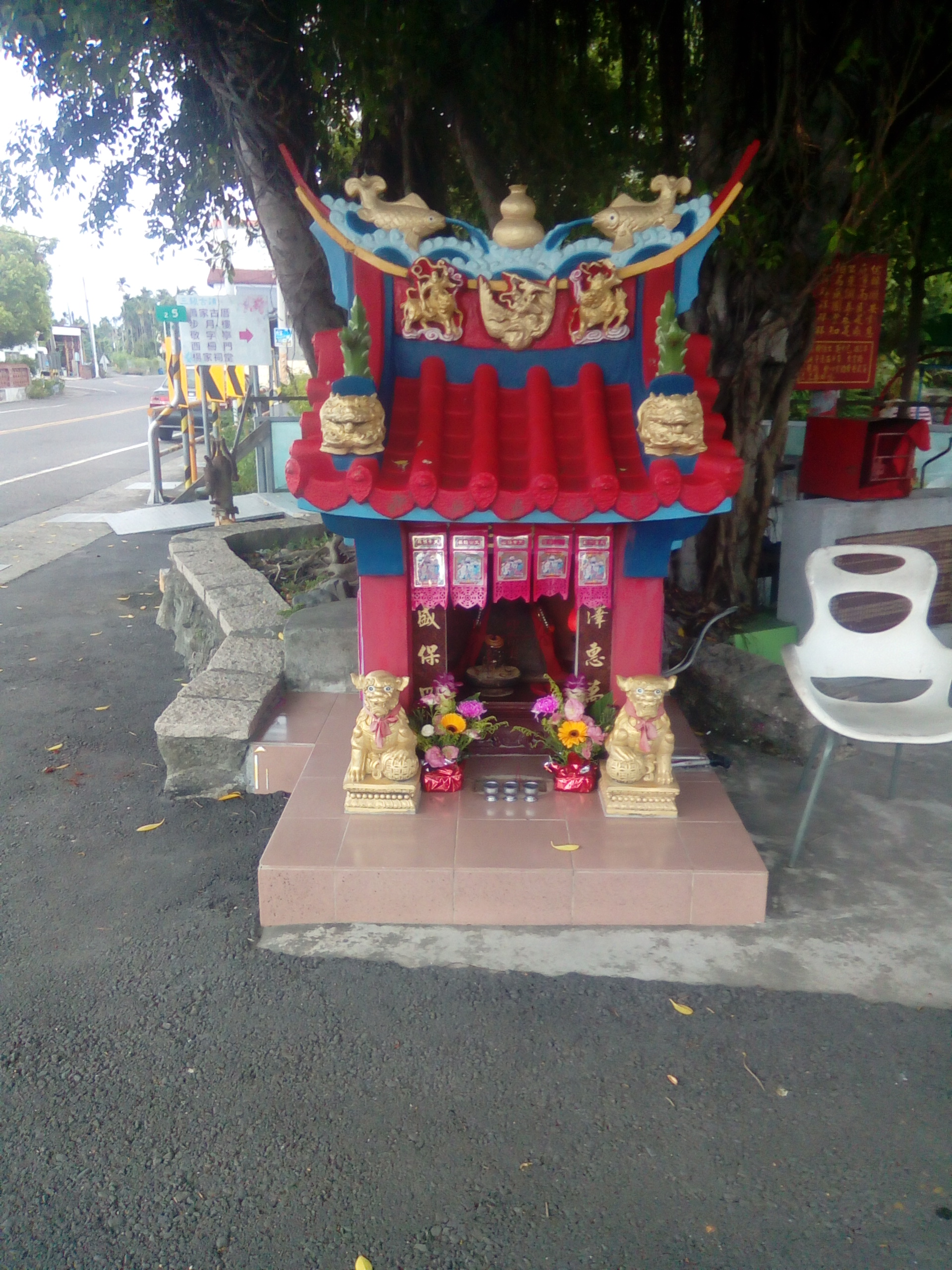 伯公 即土地公